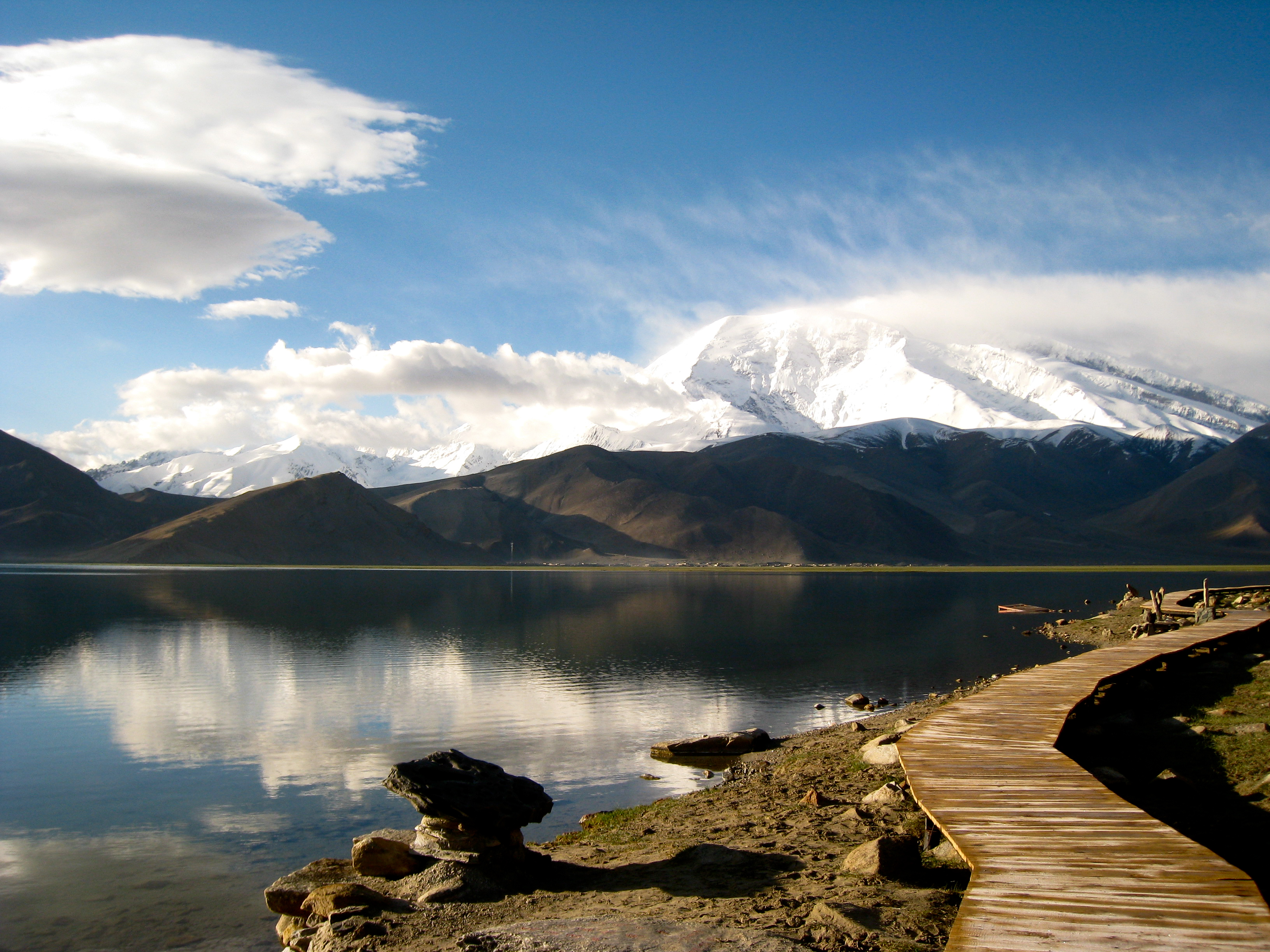 Vido al montego Kongur el la bordo de la Nigra Lago (Karakul), en Ĉinia Kirgizio; malfone ĉeborda tabulpaŝejo.